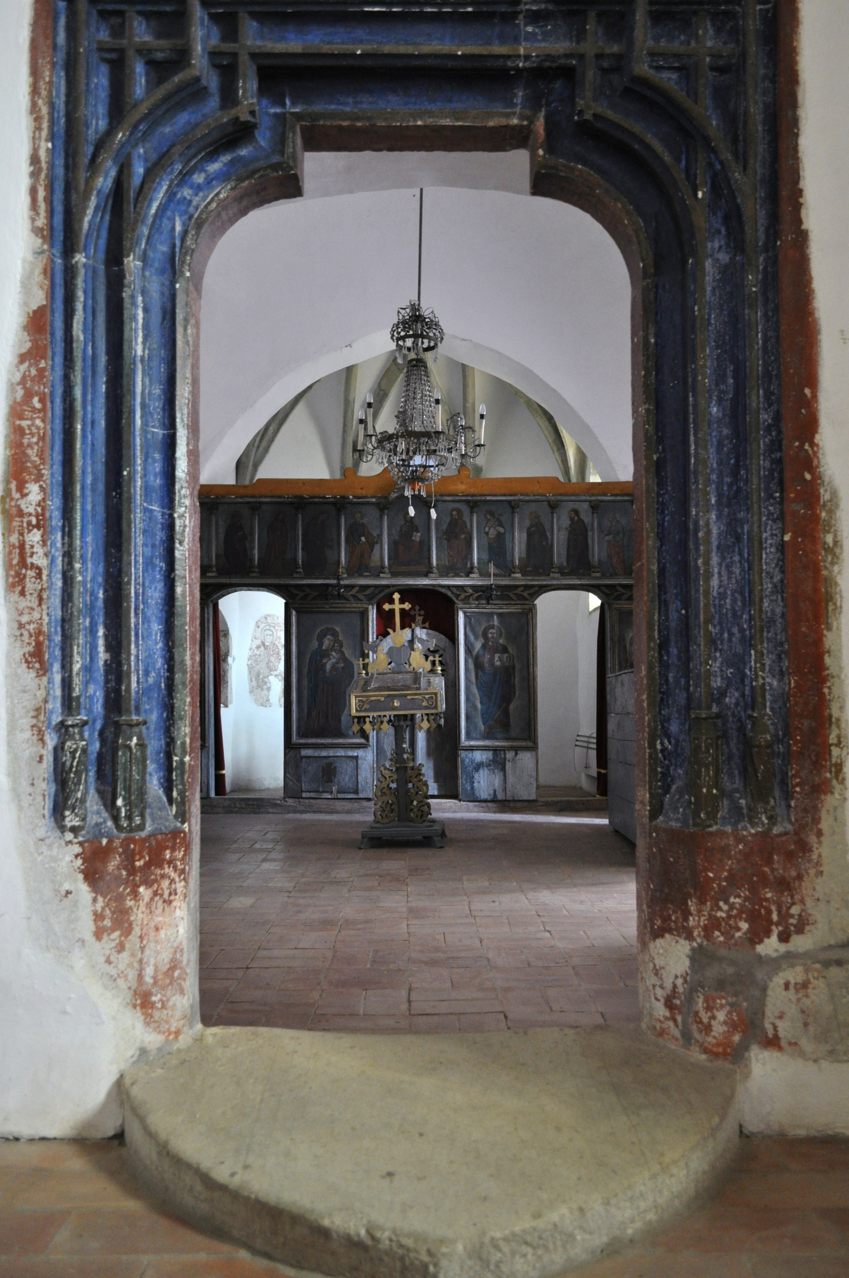 Biserica "Adormirea Maicii Domnului" a mănăstirii Vadului , sat Vad, județul Cluj